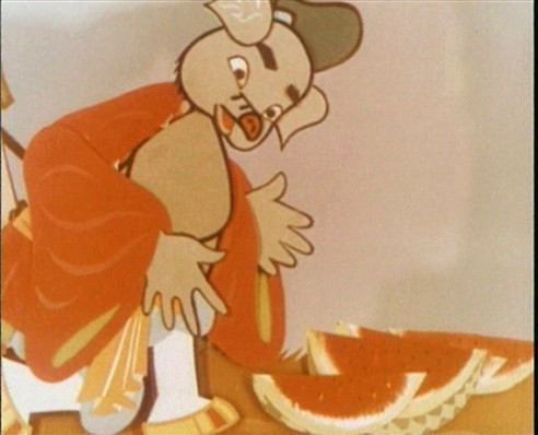 猪八戒吃西瓜，上海美影厂